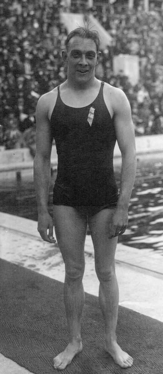 Tourelles, championnats de France de natation : Vanzeveren (portrait) : [photographie de presse] / Agence Meurisse